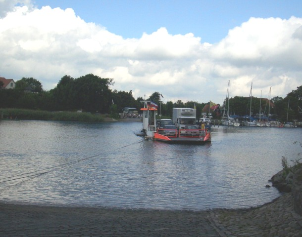 Mysunde Færge / Pram